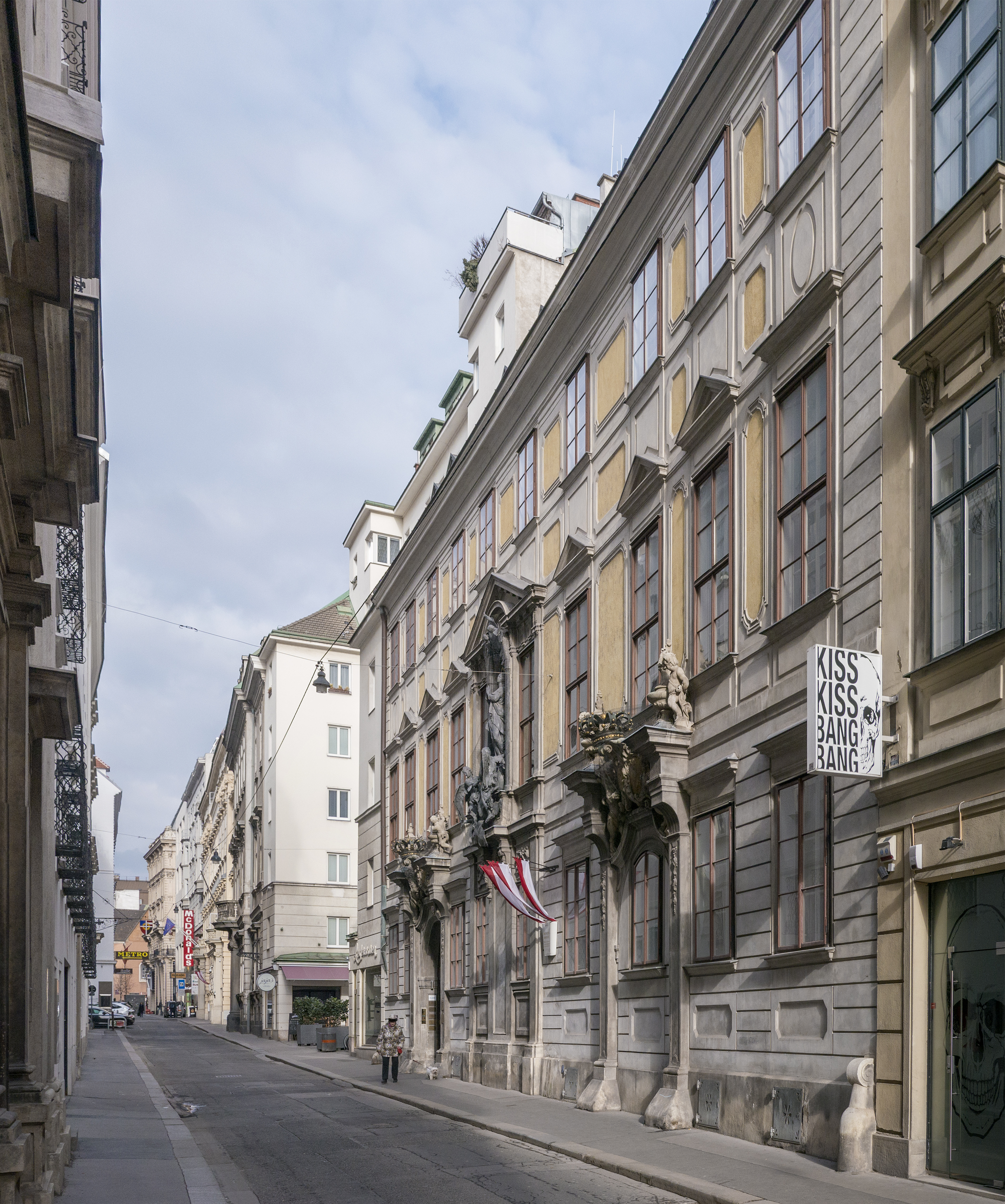 Stadtpalais, Savoy'sches Damenstift